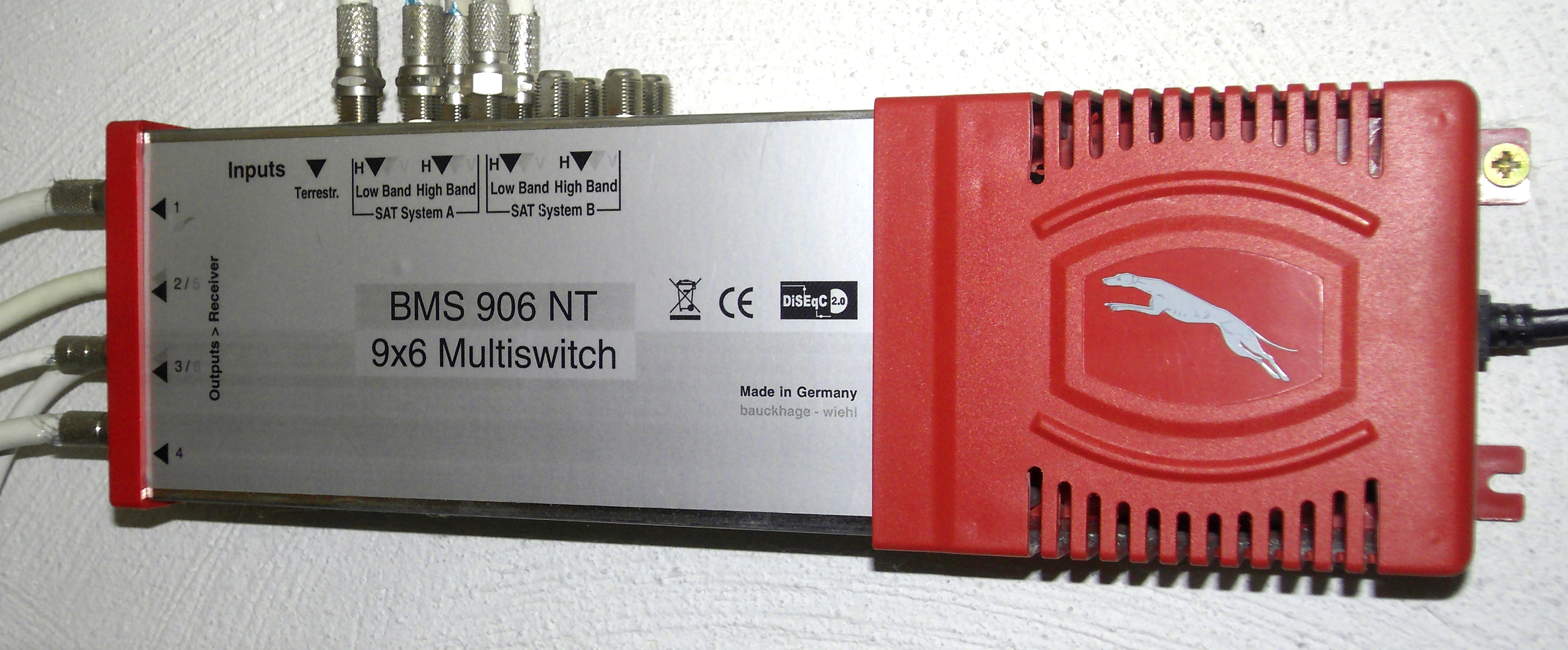 9x6 Multiswitch BMS 906 NT